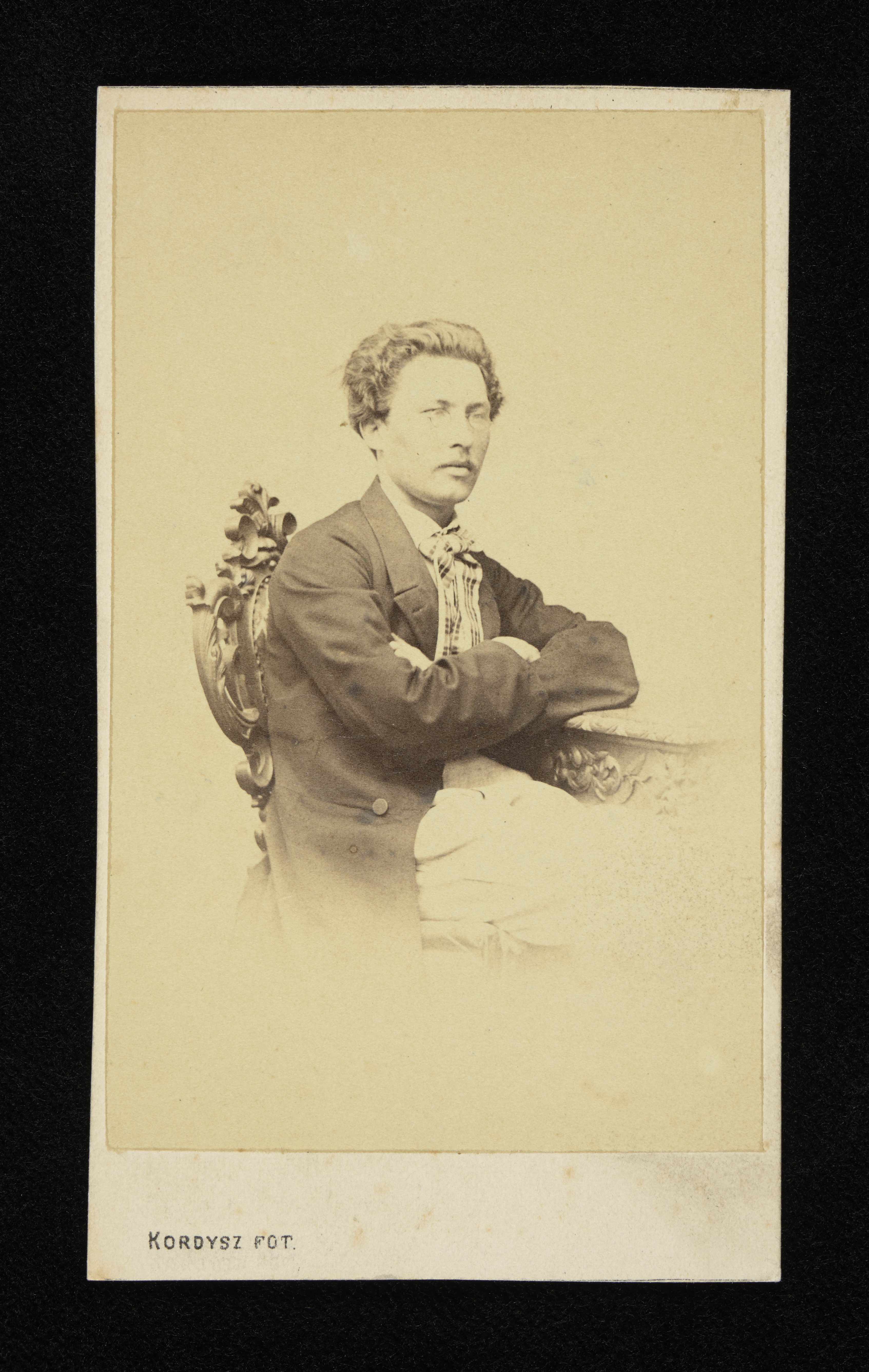 Wincenty Stadnicki, ok. 1869 r.